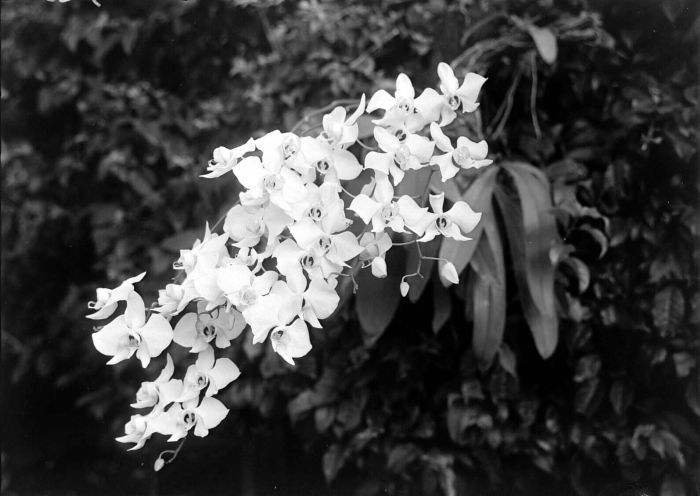 Repronegatief. Orchidee: Phalaenopsis amabilis